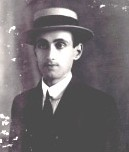 Paul Engelmann (1891–1965), izraelský architekt a filozof moravského původu